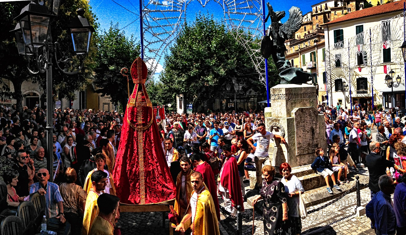 Processione di San Donato V. e M. in Piazza Carlo Coletti